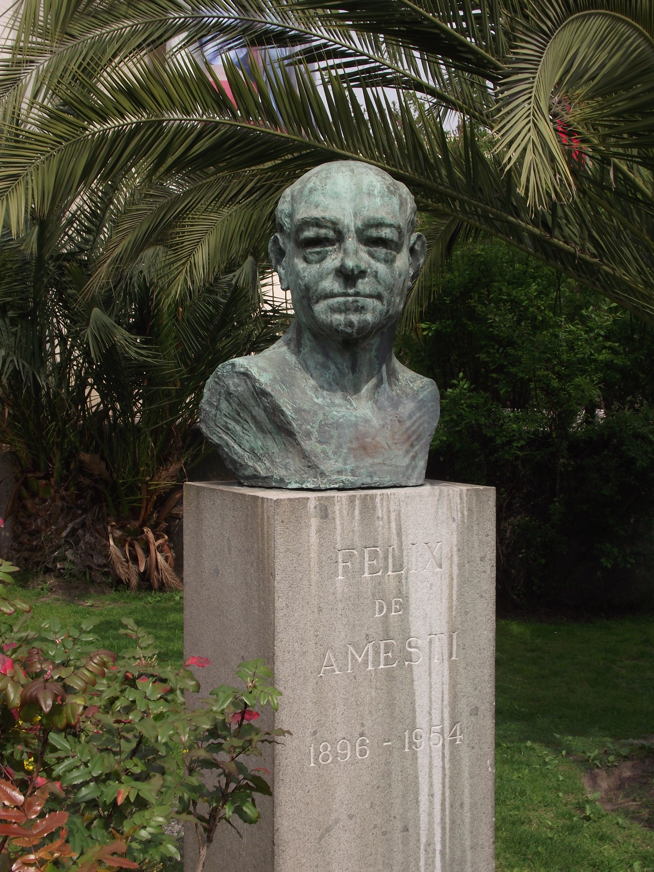 Estatua de Félix de Amesti ubicada en la entrada principal del Hospital del Salvador.